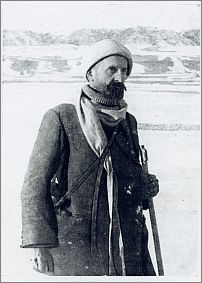 Серге́й Фёдорович Ольденбу́рг (14 (26) сентября 1863, село Бянкино, ныне Нерчинского района Читинской области — 28 февраля 1934, Ленинград) — русский и советский востоковед, один из основателей русской индологической школы, академик РАН (1908), непременный секретарь Академии наук в 1904—1929, член РБО. Министр народного просвещения Временного правительства (1917).